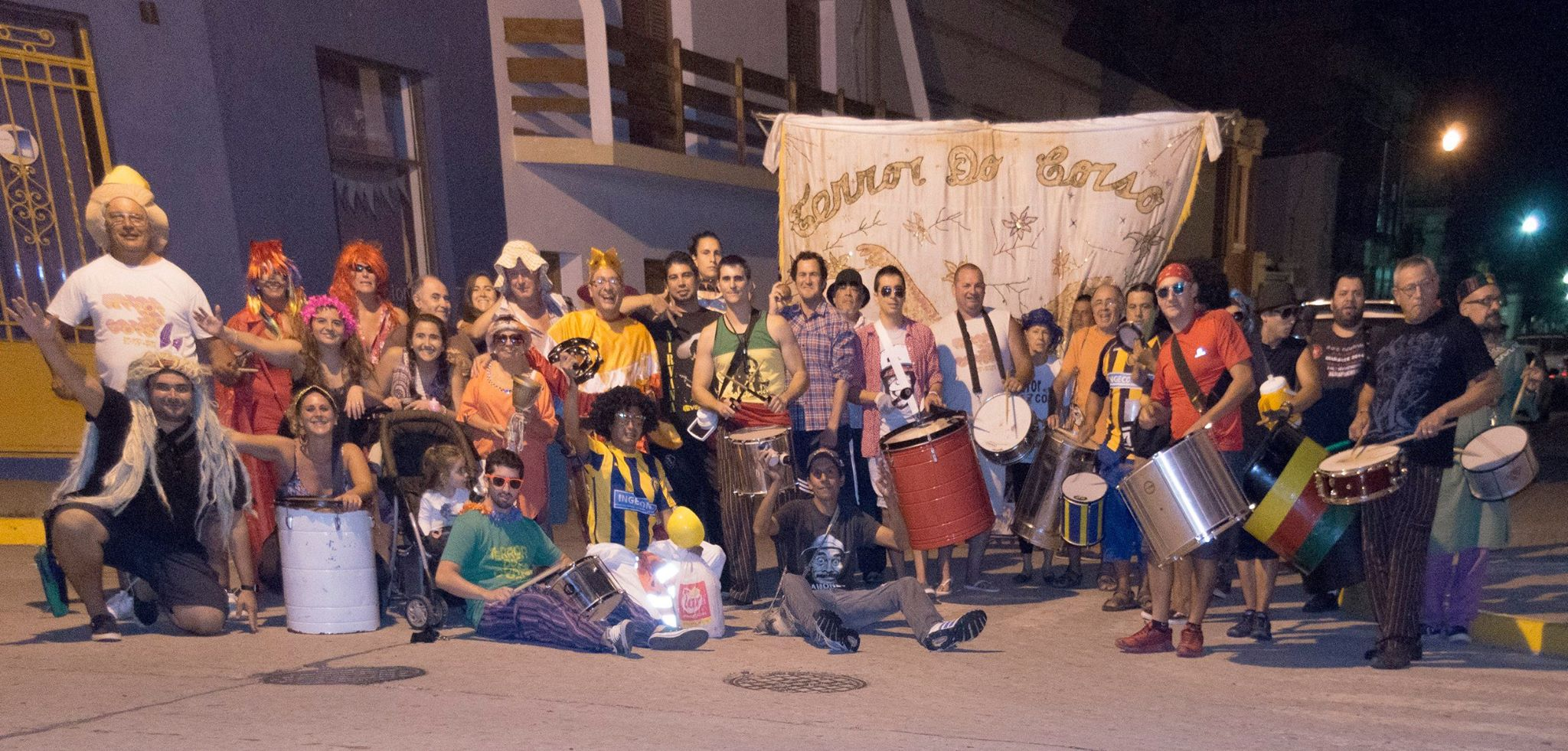 A la hora 22, un pequeño grupo denominado "El plantel estable de Terror do Corso" sale a dar vueltas por las calles de la ciudad mientras suma seguidores hasta superar los diez mil integrantes al momento de ingresar al circuito del carnaval